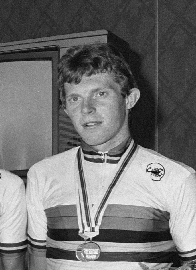 Aankomst Ned. Amateurwielerploeg uit Colorado op Schiphol. John Talen